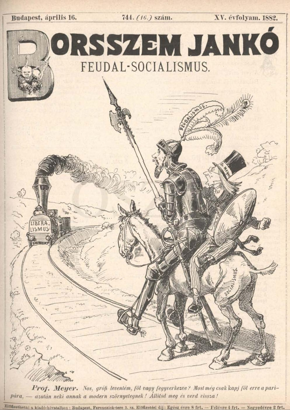 A Borsszem Jankó élclap címlapja, 744. szám, 1882. április 16